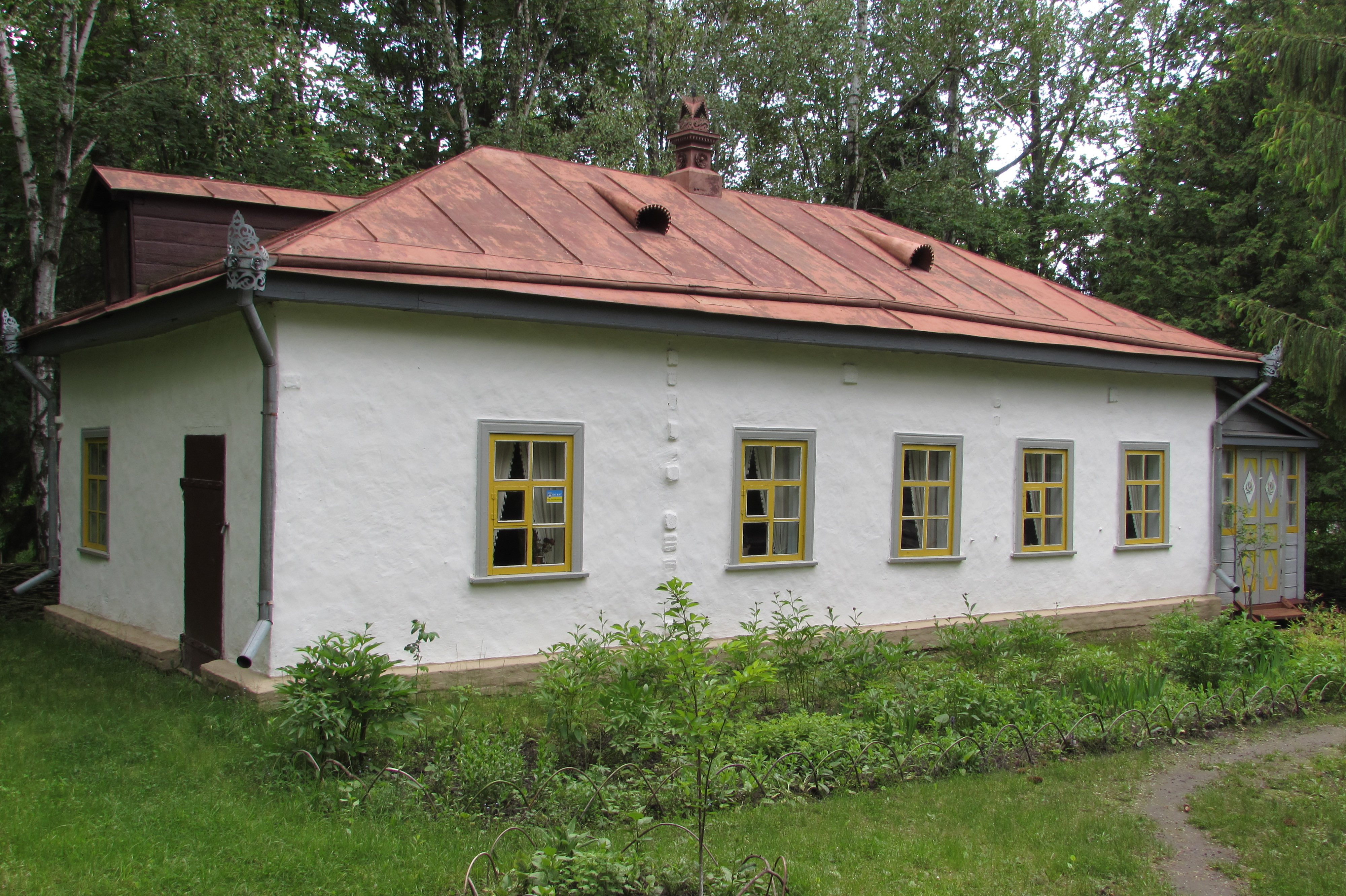 Церковно-парафіяльна школа з с. Помоклі Переяслав-Хмельницького району Київської області, Переяслав-Хмельницький, вул. Літописна, 2, у центральній частині музею в північній частині двору церковно-парафіальної школи